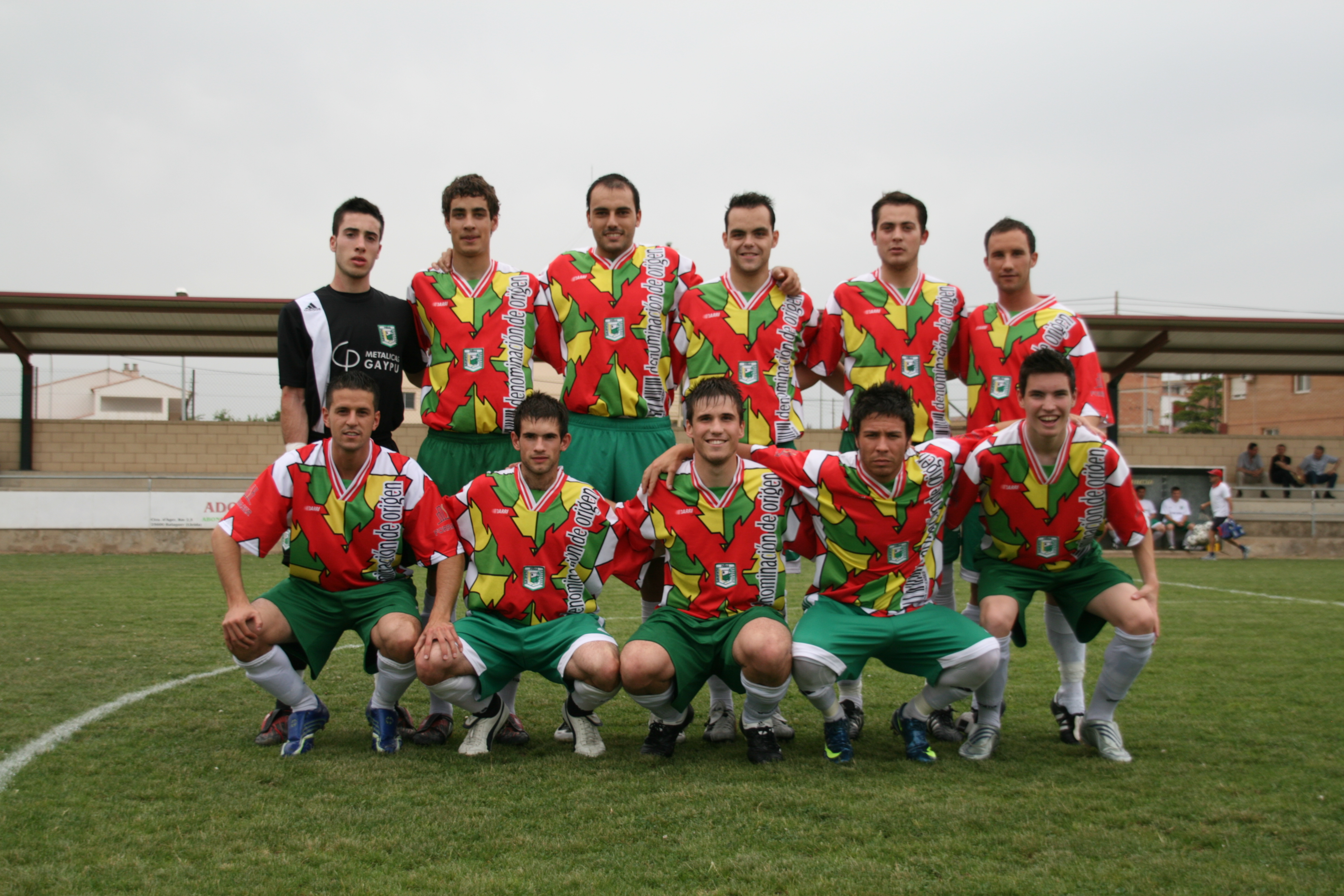 Peñas Oscenses